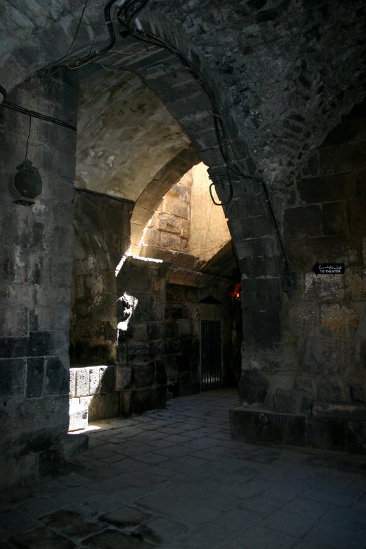 Zitadelle von Bosra, eigenes Bild von 2006 public domain Kategorie:Polarlys-Test